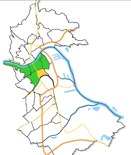 Städtische Bezirke Linz - Neustadtviertel hervorgehoben. Selbst gezeichnet auf Grundlage von: "Stadtforschung Linz: Linz 2000. Fakten, Bilder, Grafiken." (der greg:) 2.9.2005 - Lizenz: CC-BY